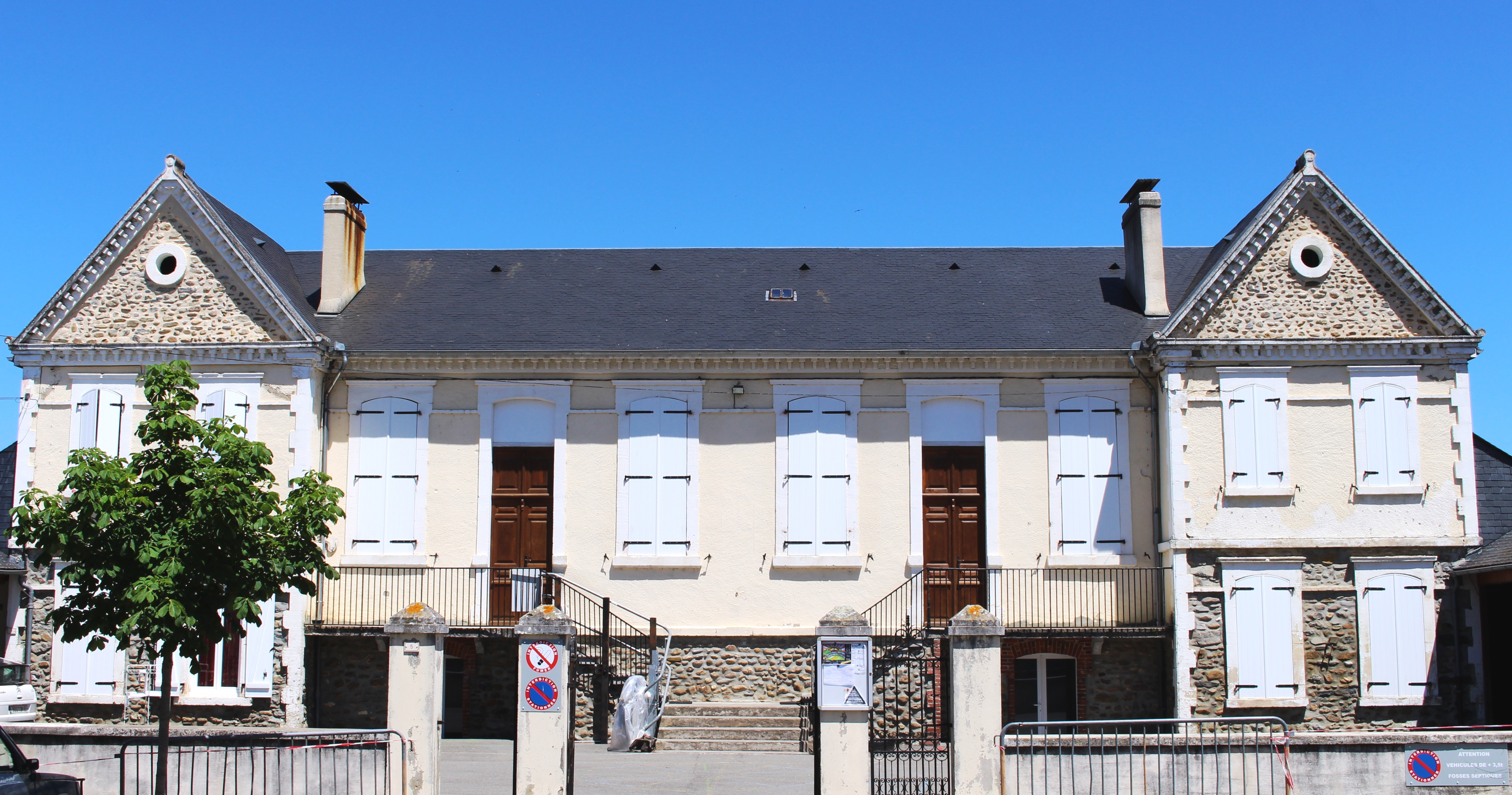 École de Bourg-de-Bigorre (Hautes-Pyrénées)